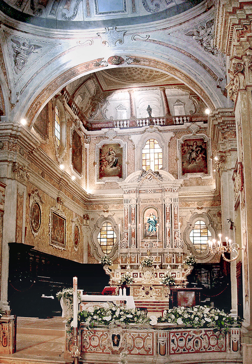 Il presbiterio della Cattedrale di San Severo. Licensing Categoria:San Severo